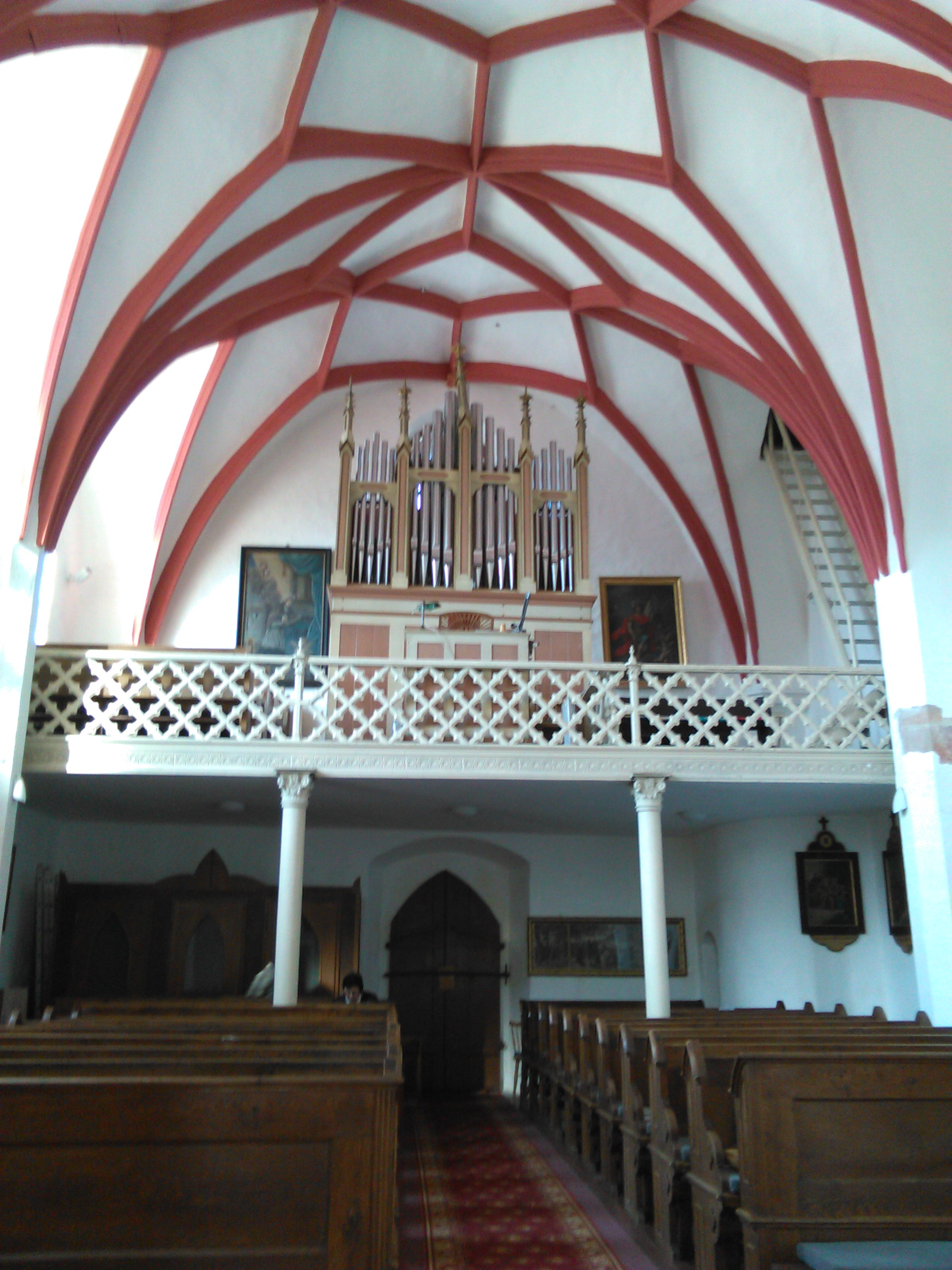 interier